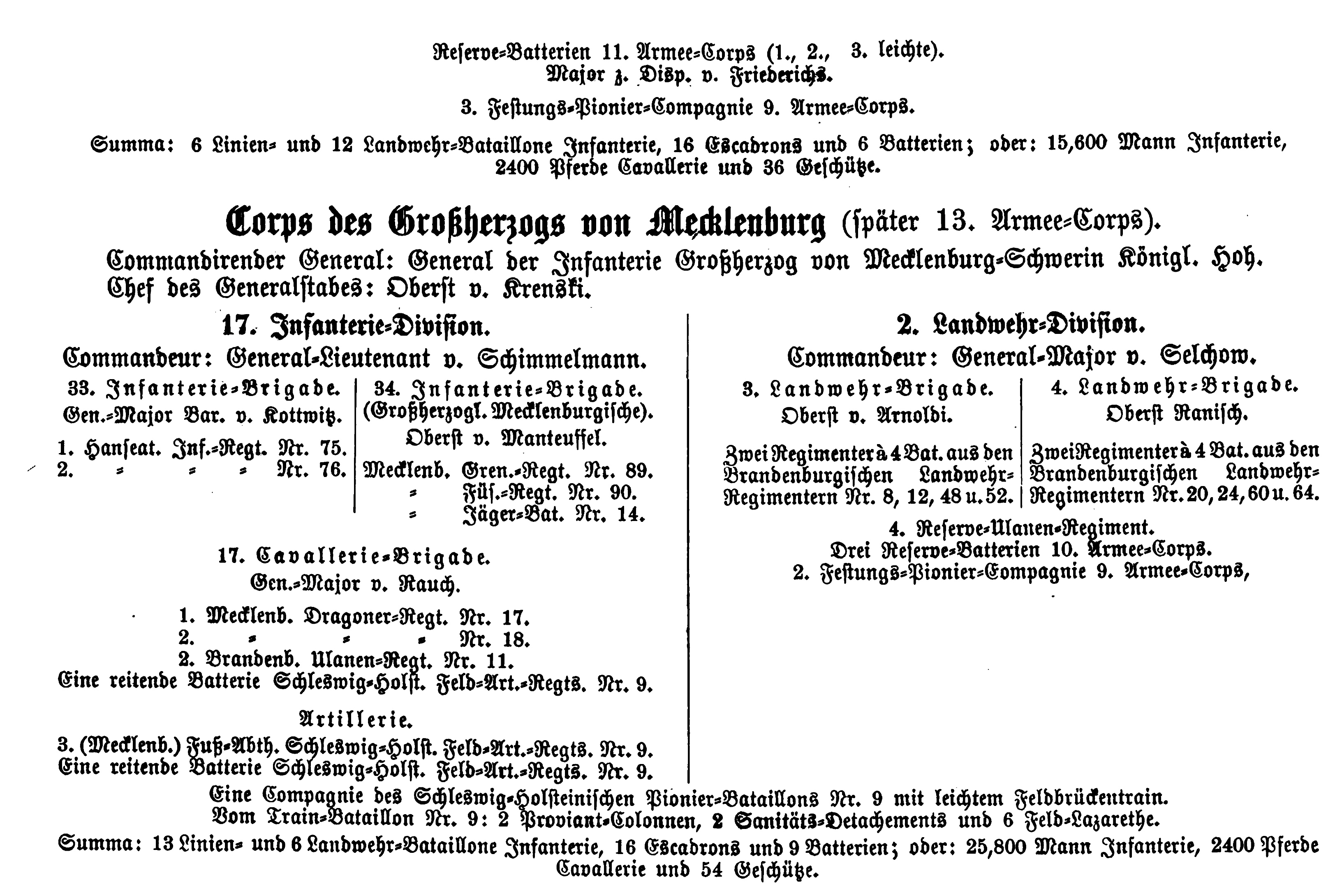 Aufstellung Corps Großherzog von Mecklenburg